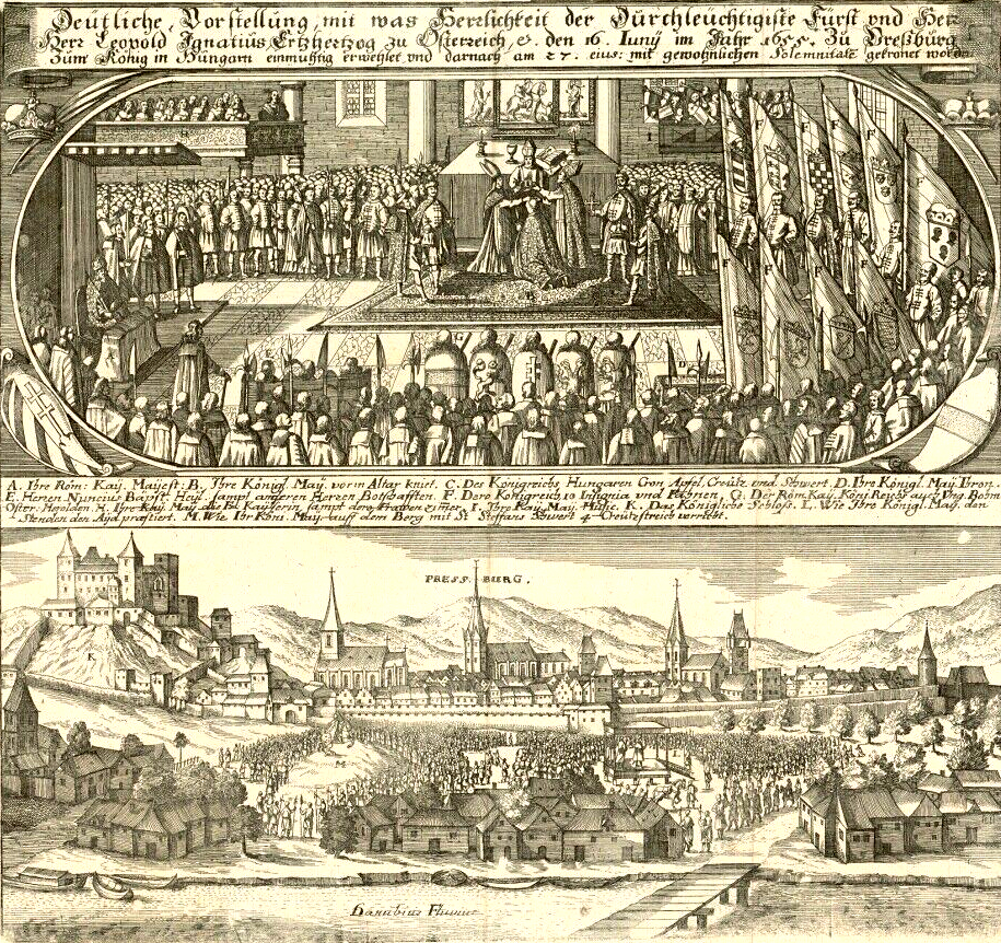 Coronation of Leopold I, Holy Roman Emperor, at St. Martin's Cathedral, Pressburg (Bratislava) Deutliche Vorstellung mit was Herrlichkeit der Durchleüchtigste fürst und Herr Leopold Ignatius Ertzhertzog zu Osterreich etc. den 16. Junÿ in Jahr 1655. Zu Dreszburg. Zum König in Hungarn einmuhting ermehlet und darnach am 27. eius mit gewohnlichen Solemnitate gekrönet worden.[1]